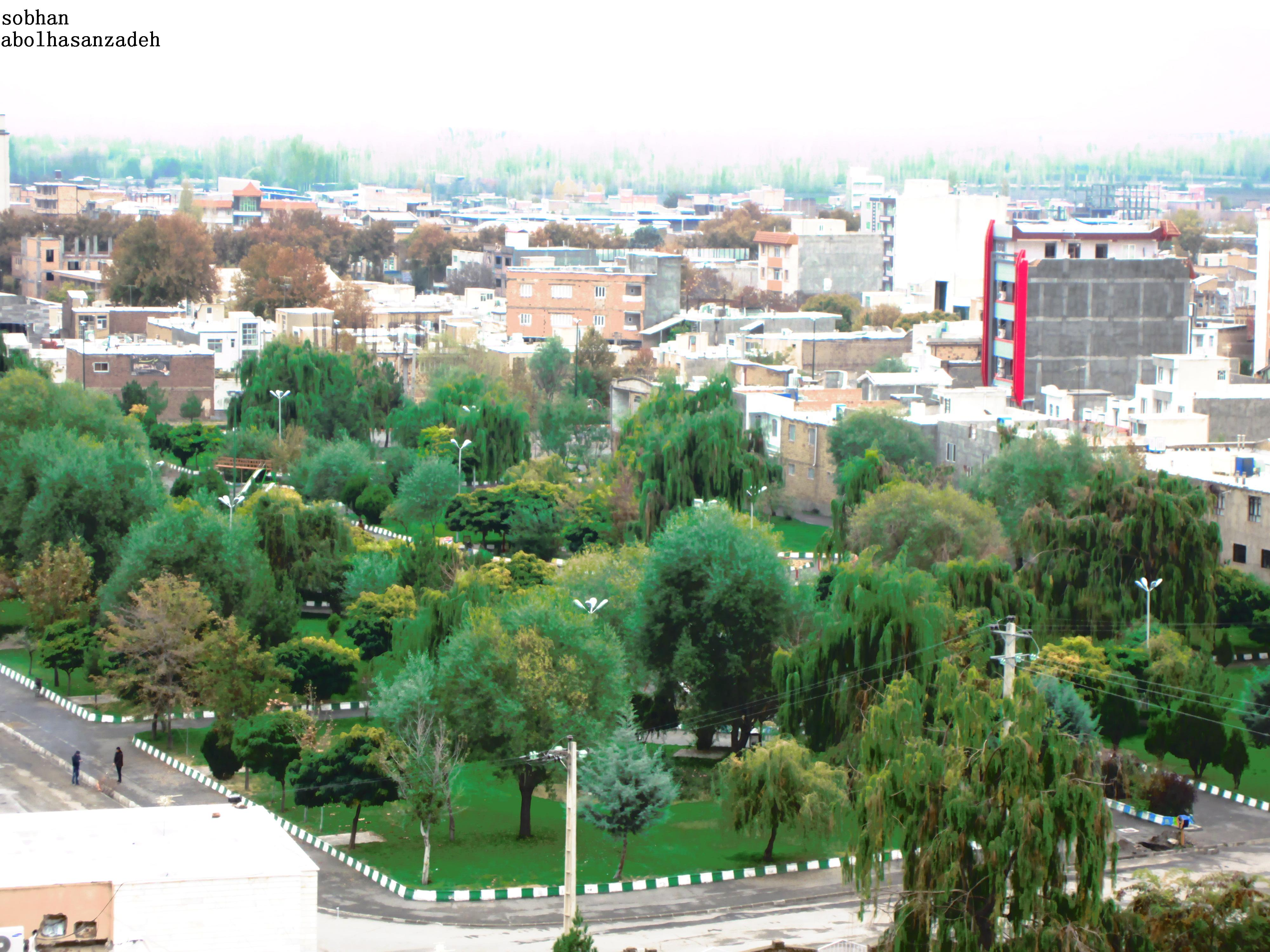 پارک شی نوایی خوی